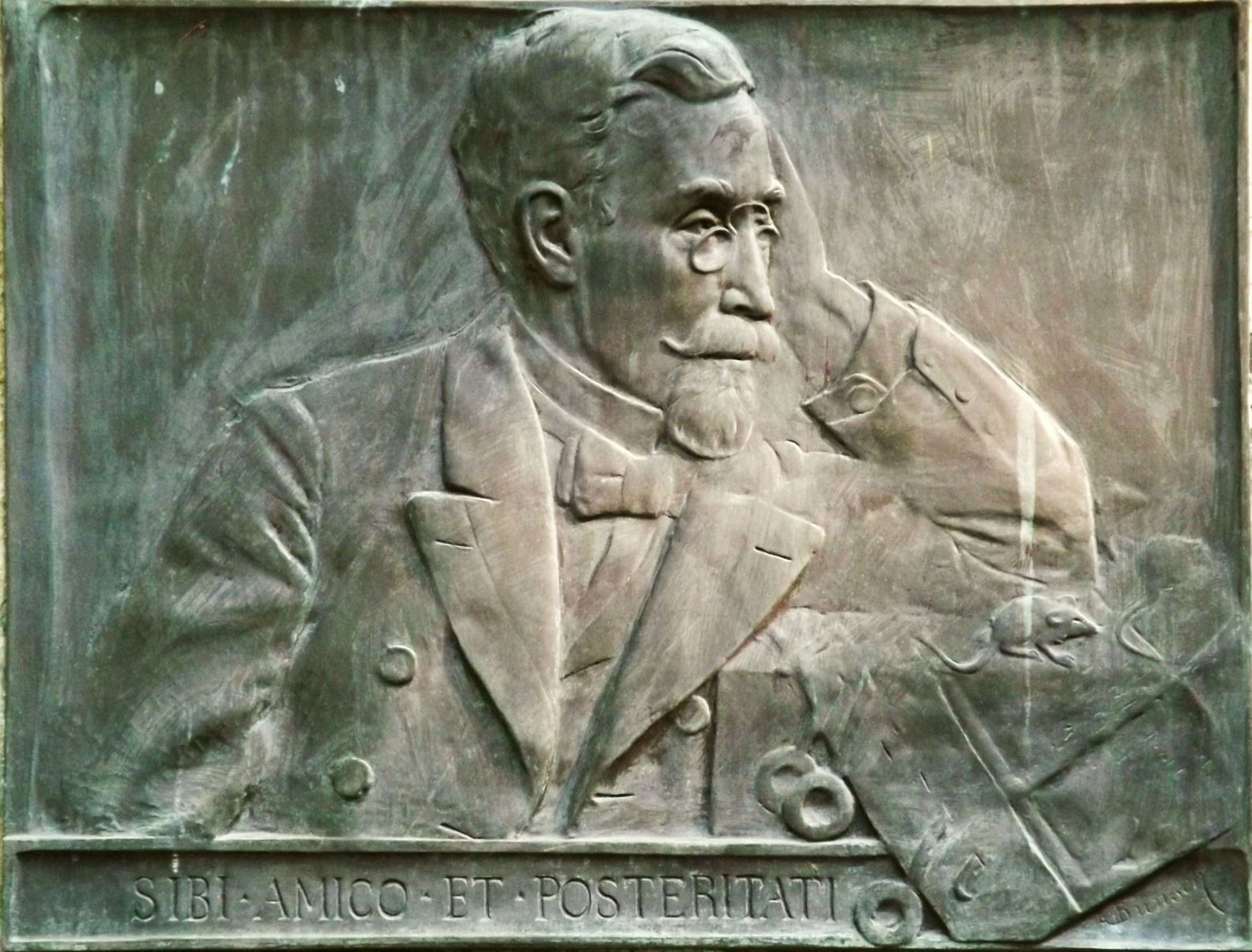 Alojzy Bunsch - portret A. Chmiela, ok. 1900. Umieszczona na grobowcu na Cmentarzu Rakowickim w Krakowie.